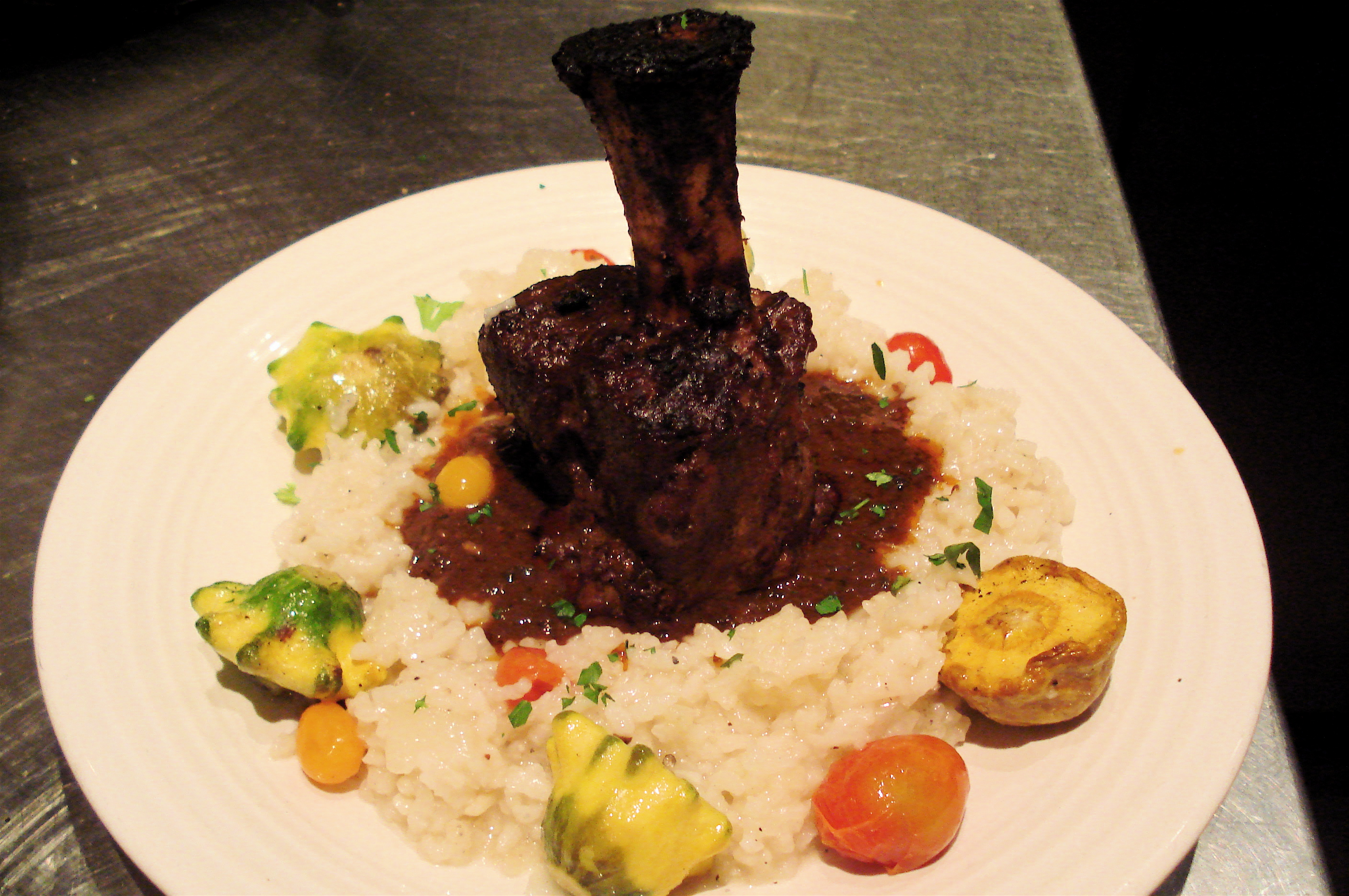 pork osso buco